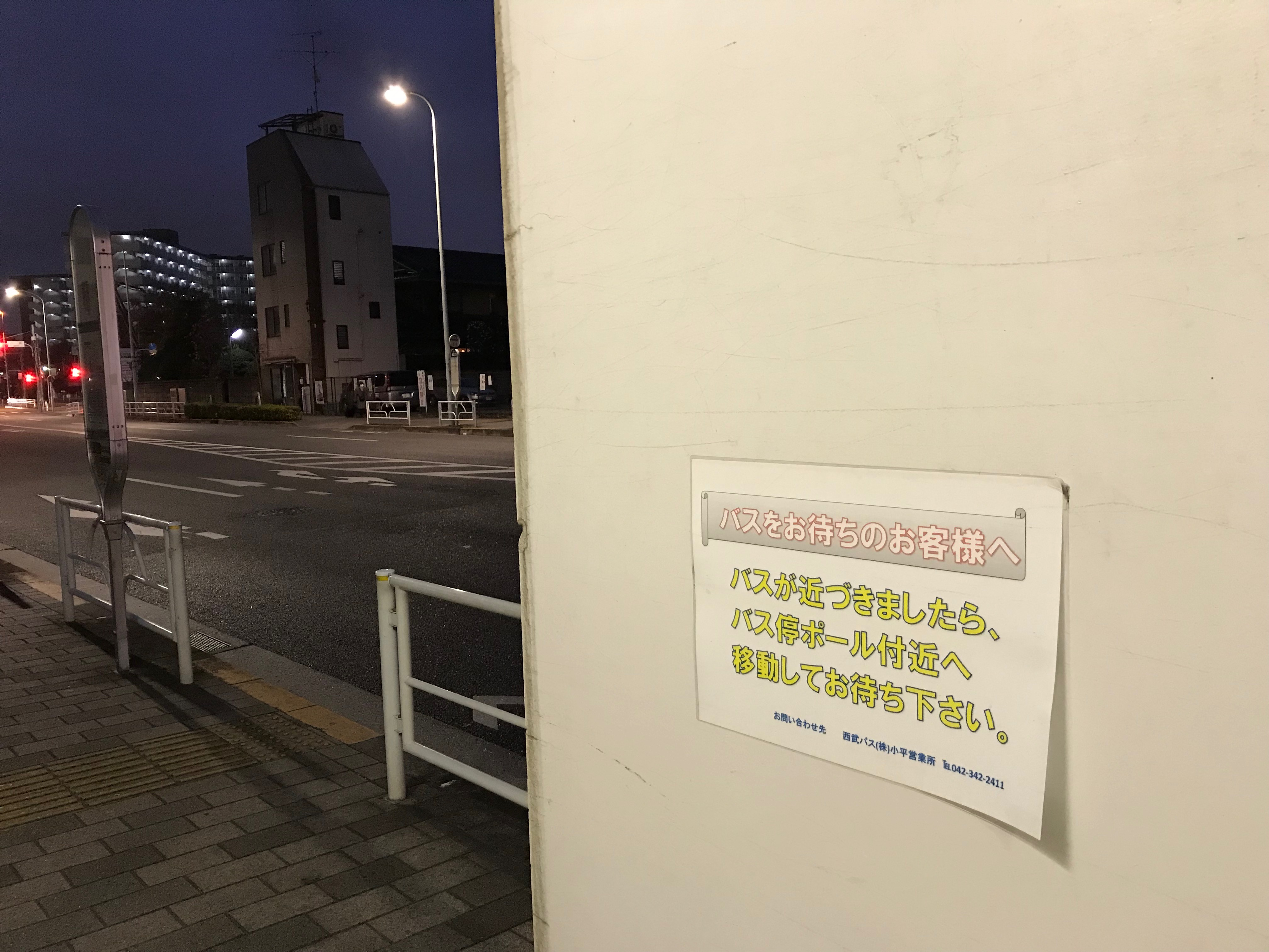 八坂駅バス停